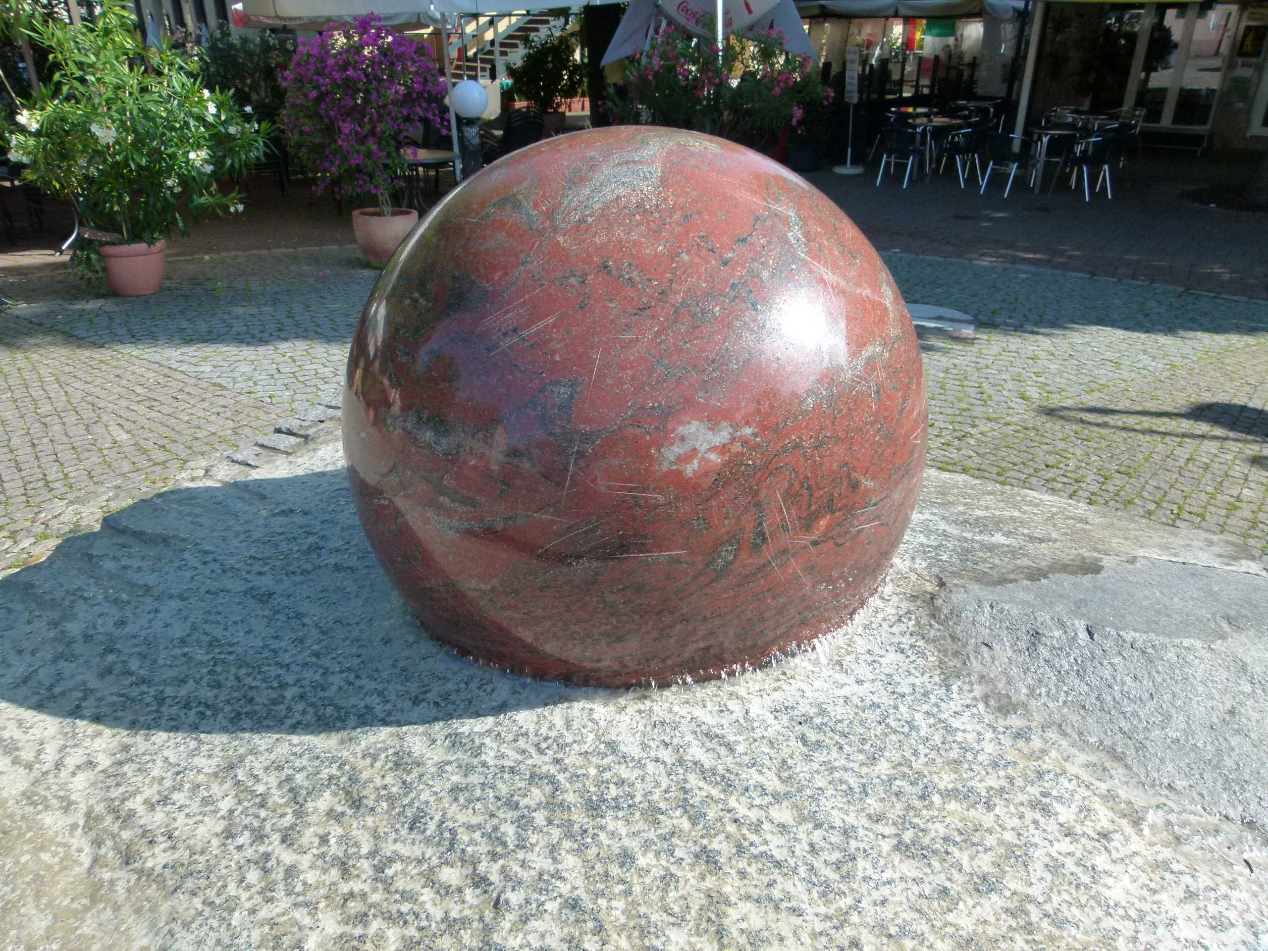 Kugelbrunnen mit Kugel aus Jaspis mit 1 Meter Durchmesser am Neutorplatz in Breisach